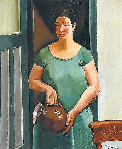 Staande vrouw